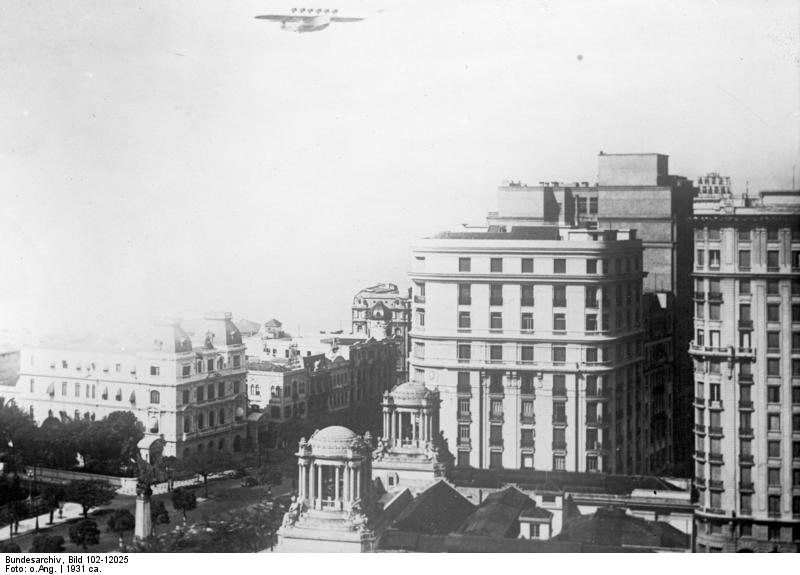 Das deutsche Dornier-Riesenflugboot "Do X" über der brasilianischen Hauptstadt Rio de Janairo! Das deutsche Flugschiff "Do X" nach der Ueberquerung des Ozeans über der südamerikanischen Hauptstadt Rio de Janairo.